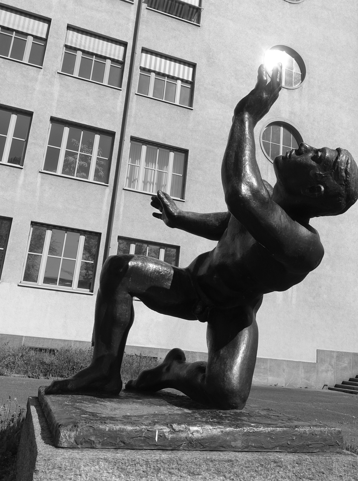 Ernst Suter (1904–1987): Kampf mit dem Engel, 1947, Standort: Schulhof des Wirtschaftsgymnasiums Basel, Schweiz